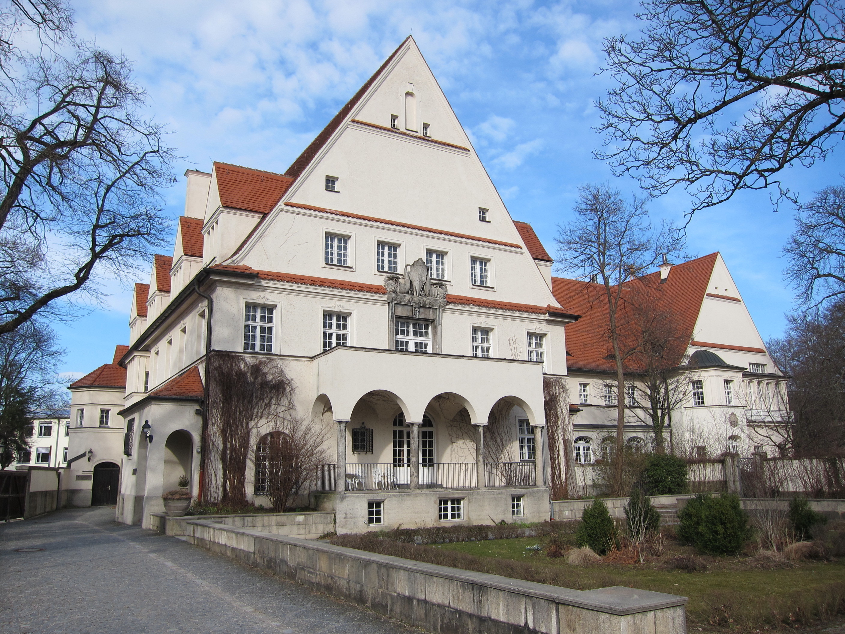 Neuberghauser Straße 11; Villa des Malers Friedrich Lauer, jetzt Städtischer Kindergarten und Städtische Sing- und Musikschule. Malerischer Gruppenbau in abgewandelter deutscher Renaissance, 1912 von Wilhelm Scherer, mit südlich vorgelagertem Garten; östlicher Abschluss des Bogenhauser Kirchplatzes.